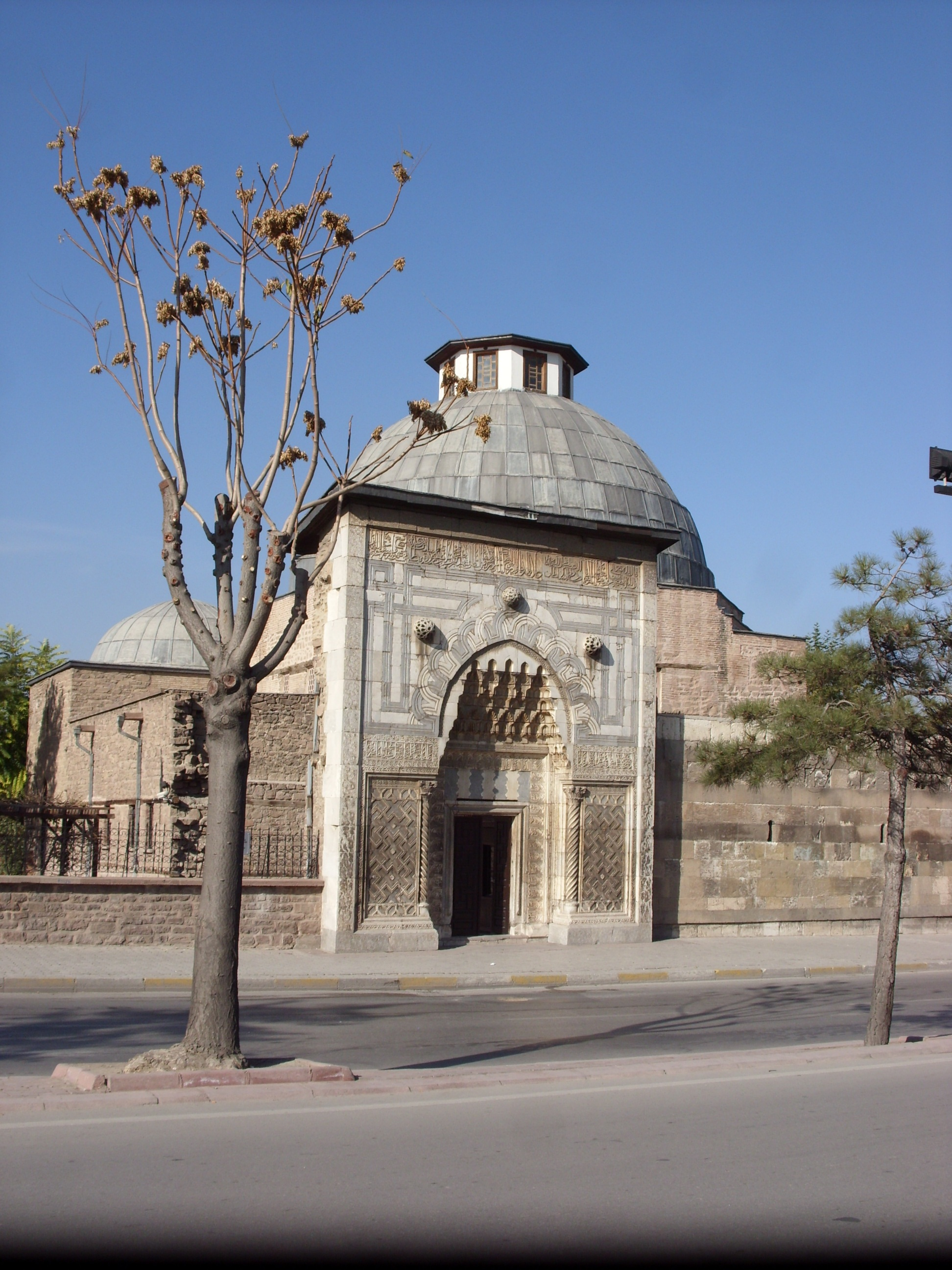 KARATAY MEDRESESİ